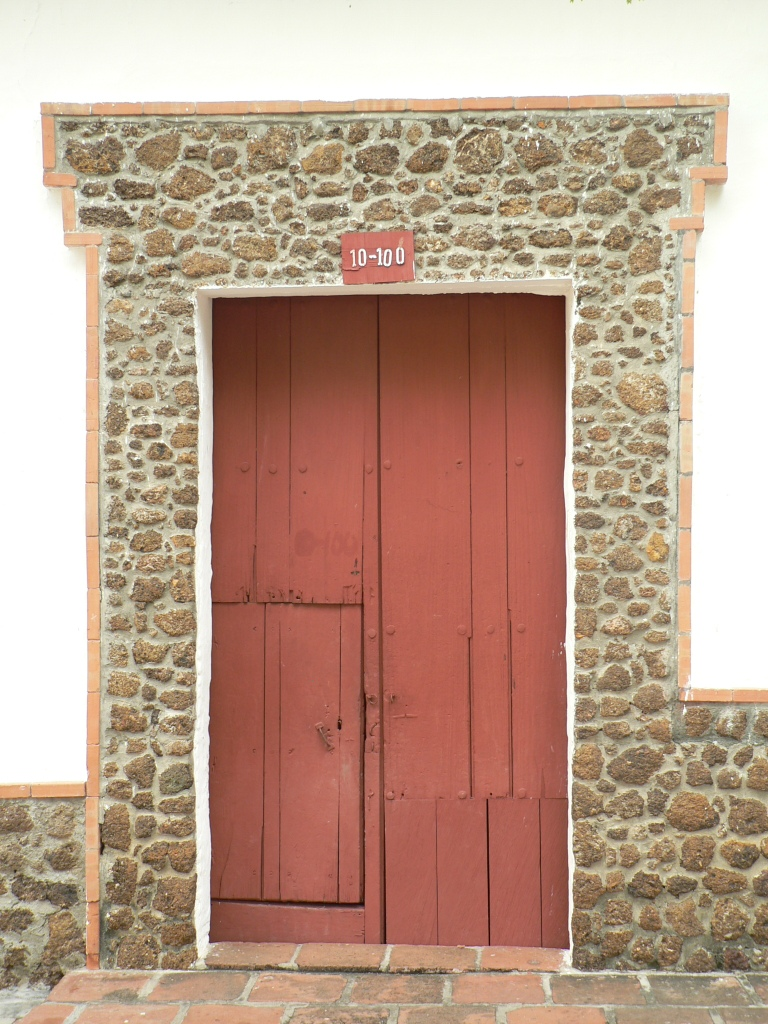 Puerta, municipio de Santa Fe de Antioquia. Departamento de Antioquia, Colombia.